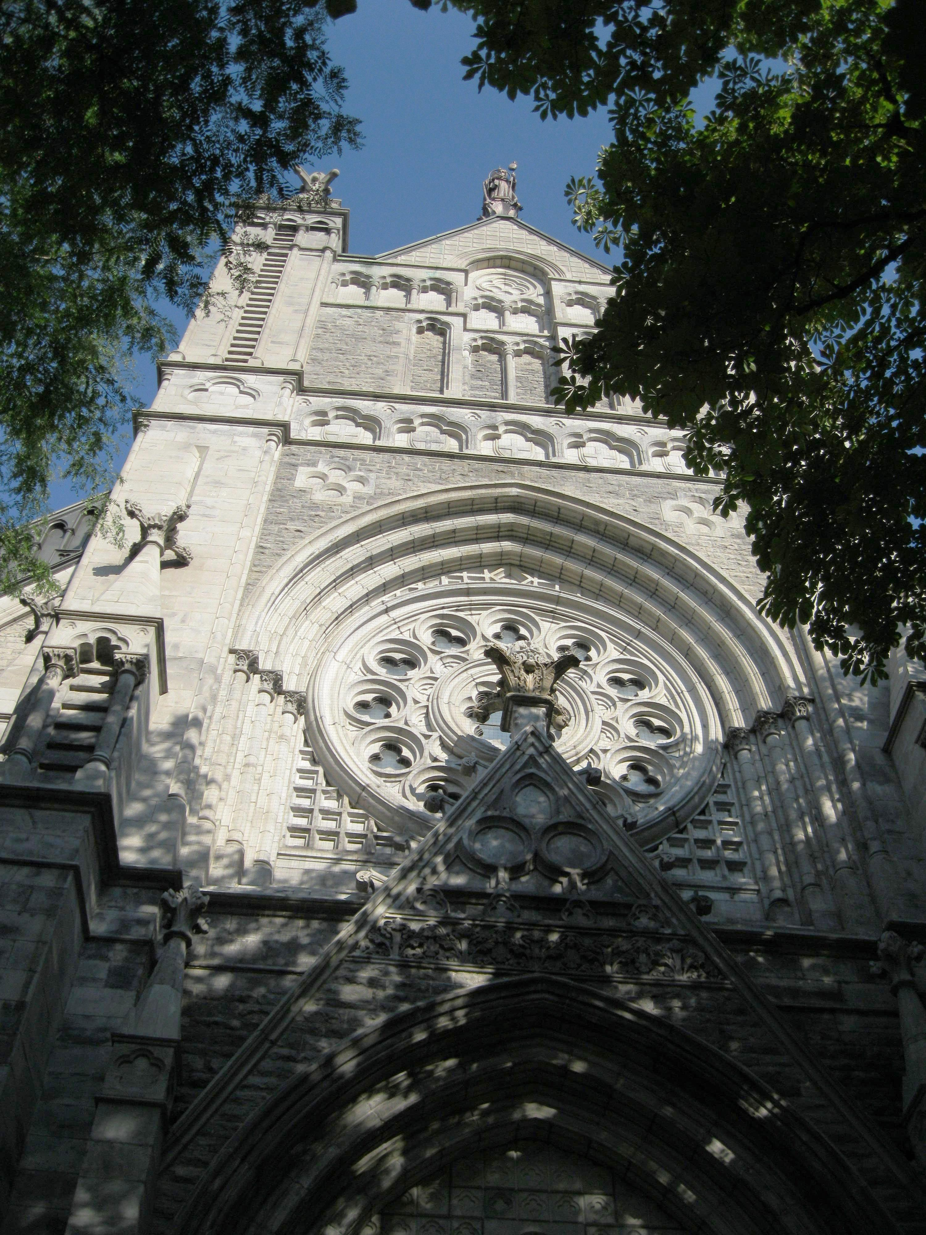 Le transept sud de l'Église-de-Saint-Jacques, classé monument historique, est la façade d'un bras du segment transversal d'un ancien lieu de culte de confession catholique construit de 1889 à 1891. Il est situé au 455, rue Sainte-Catherine Est, dans l'arrondissement de Ville-Marie à Montréal. Il est intégré au pavillon Judith-Jasmin de l'Université du Québec à Montréal.